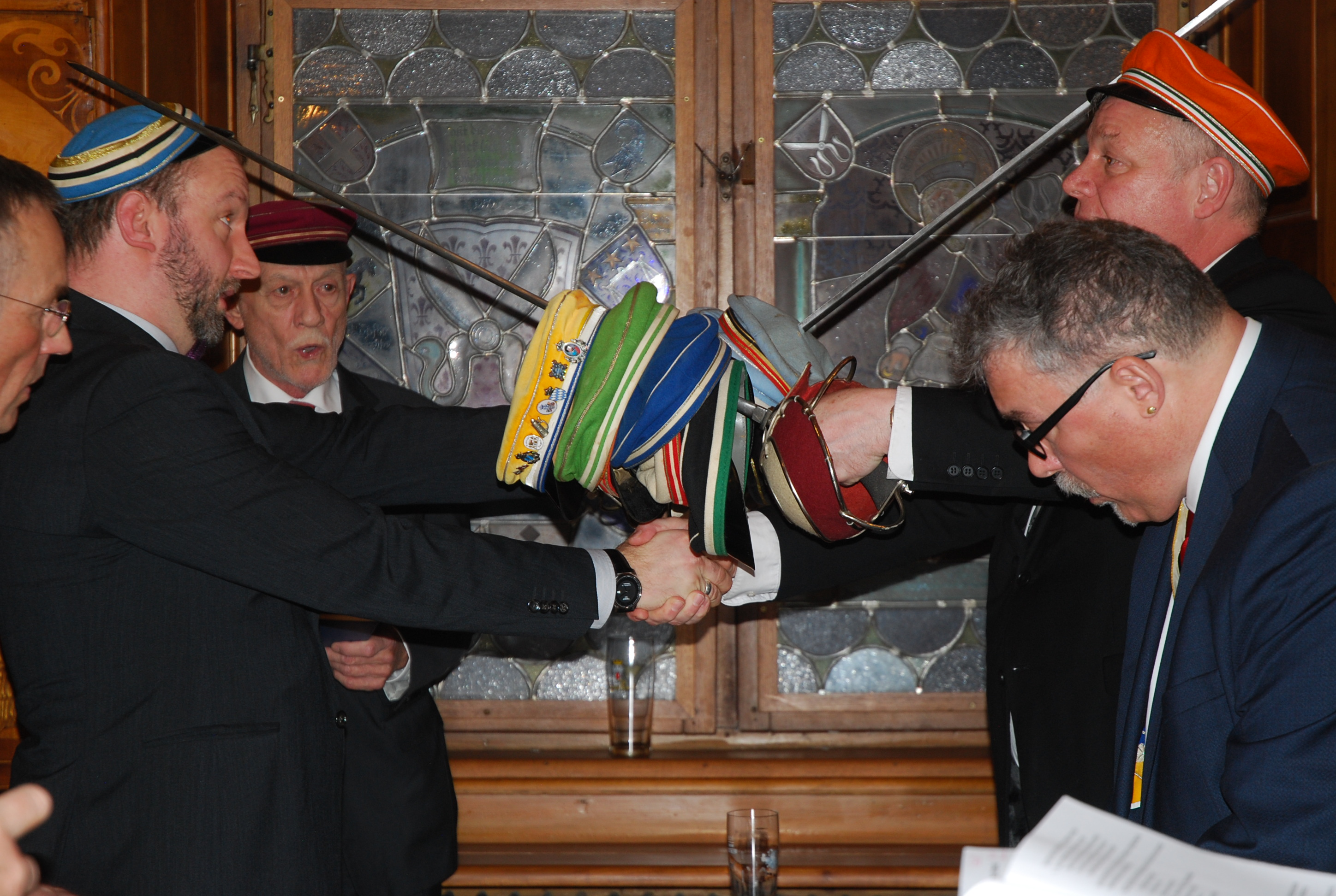 Rücklaufender Landesvater (Brauch) mit Rückgabe der durchstochenen Mützen in Basel